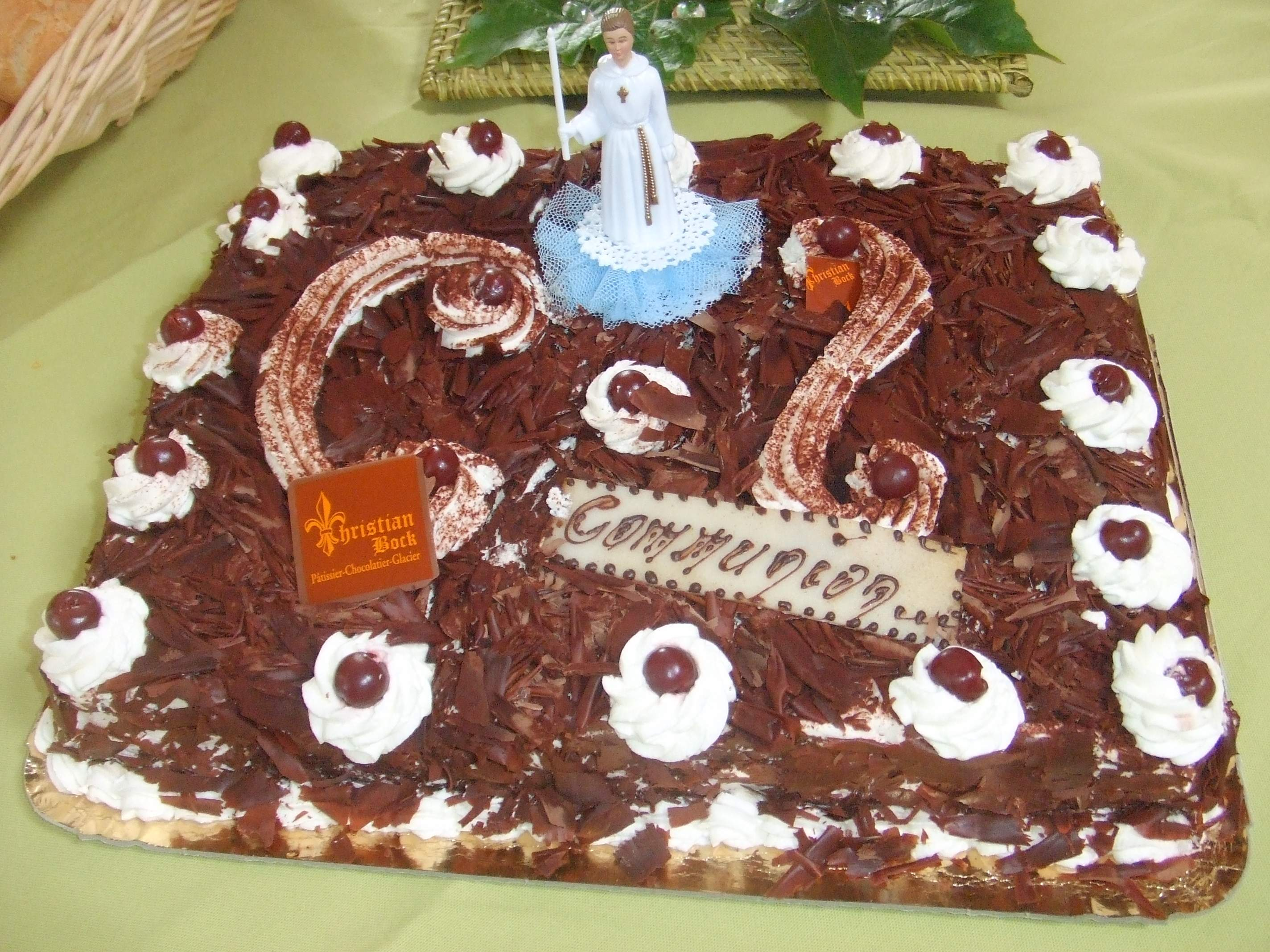 Gâteau pour une communion à Orschwiller (Bas-Rhin, France).